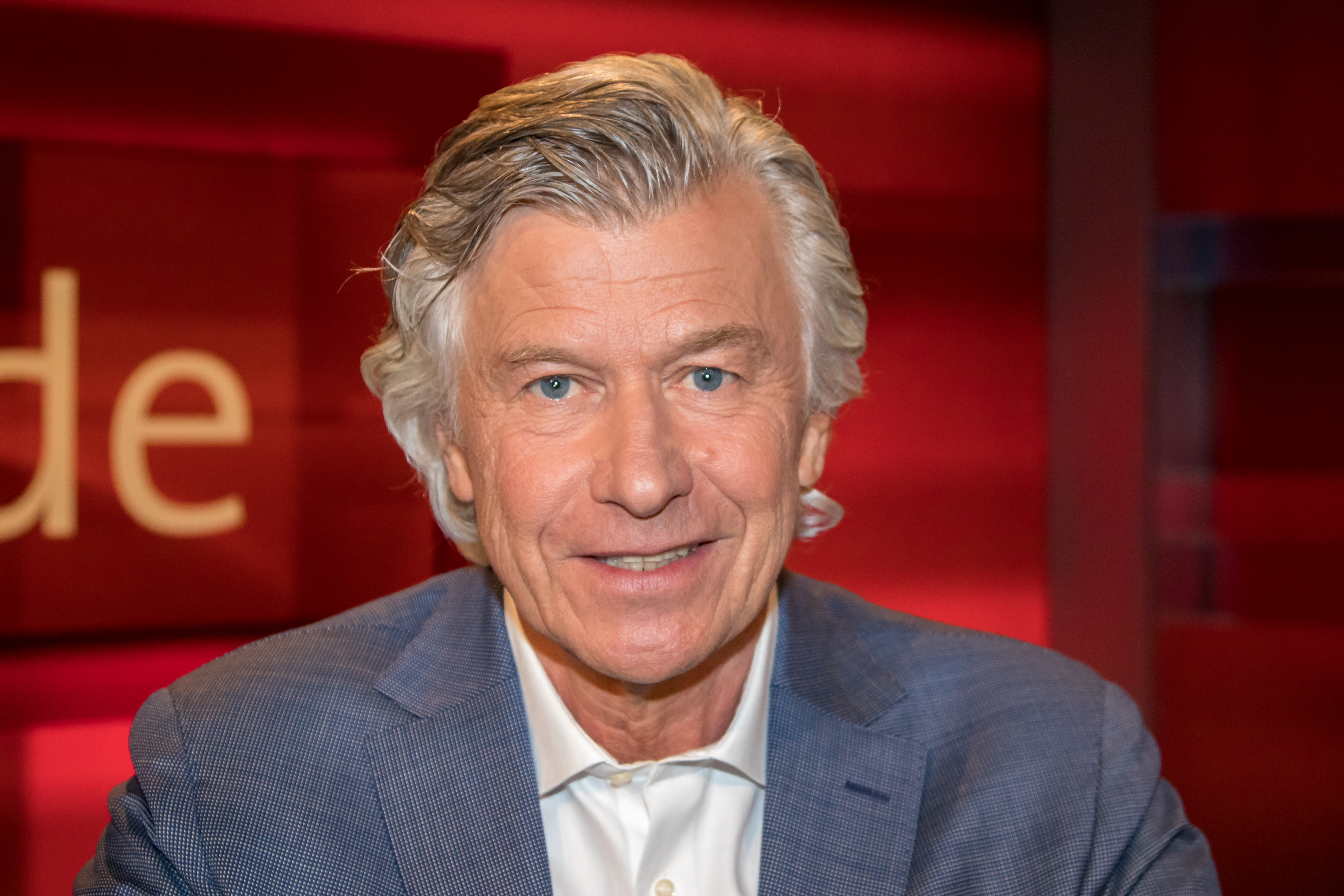 in der WDR-Sendung "hart aber fair" am 3. April 2017